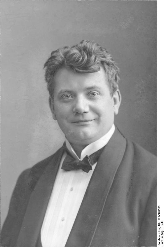 Otto Reutter Reutter, Otto 2284-40 [Otto Reutter (Porträt)] Abgebildete Personen: Reutter, Otto: Vortragskünstler, Humorist, Deutschland